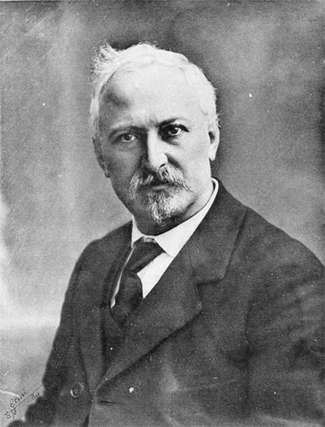 Angelo Battelli (1862-1916)